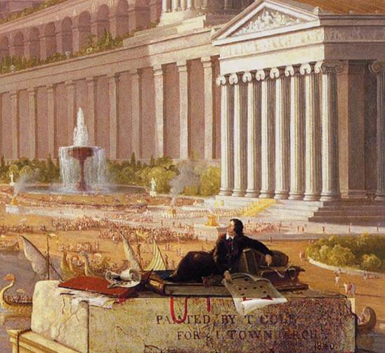 detail